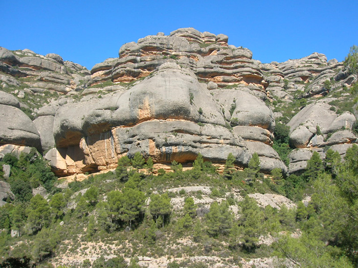 Foto meva del Montsant, agost 2005